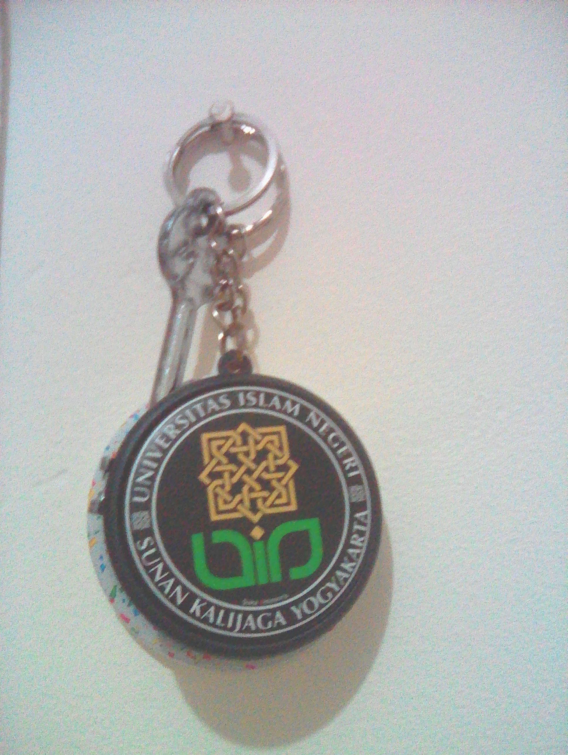 Gantungan Kunci UIN SUKA